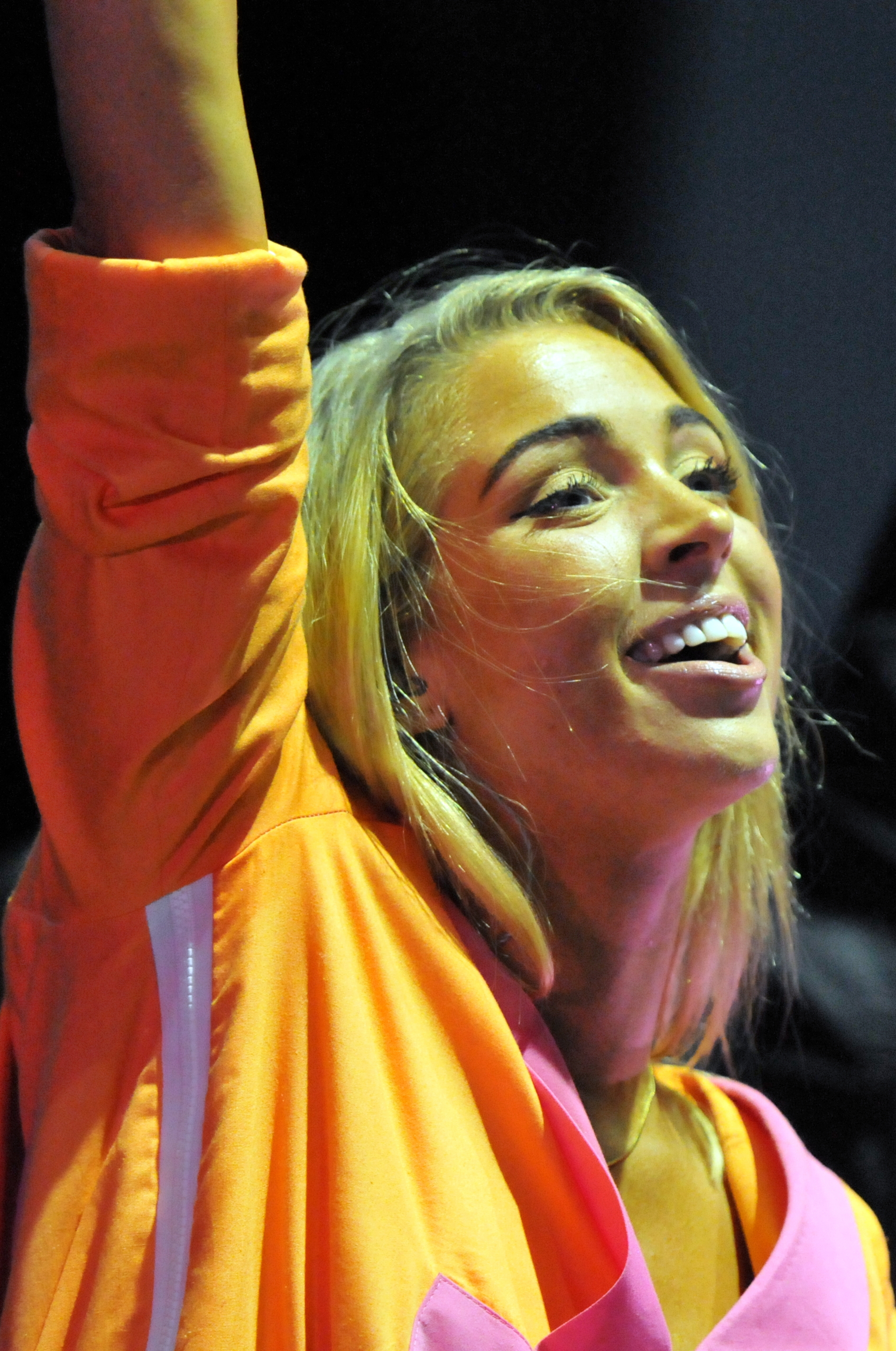 DSDS - Live on Tour. 27. Juli 2014, Stadthalle Wien.